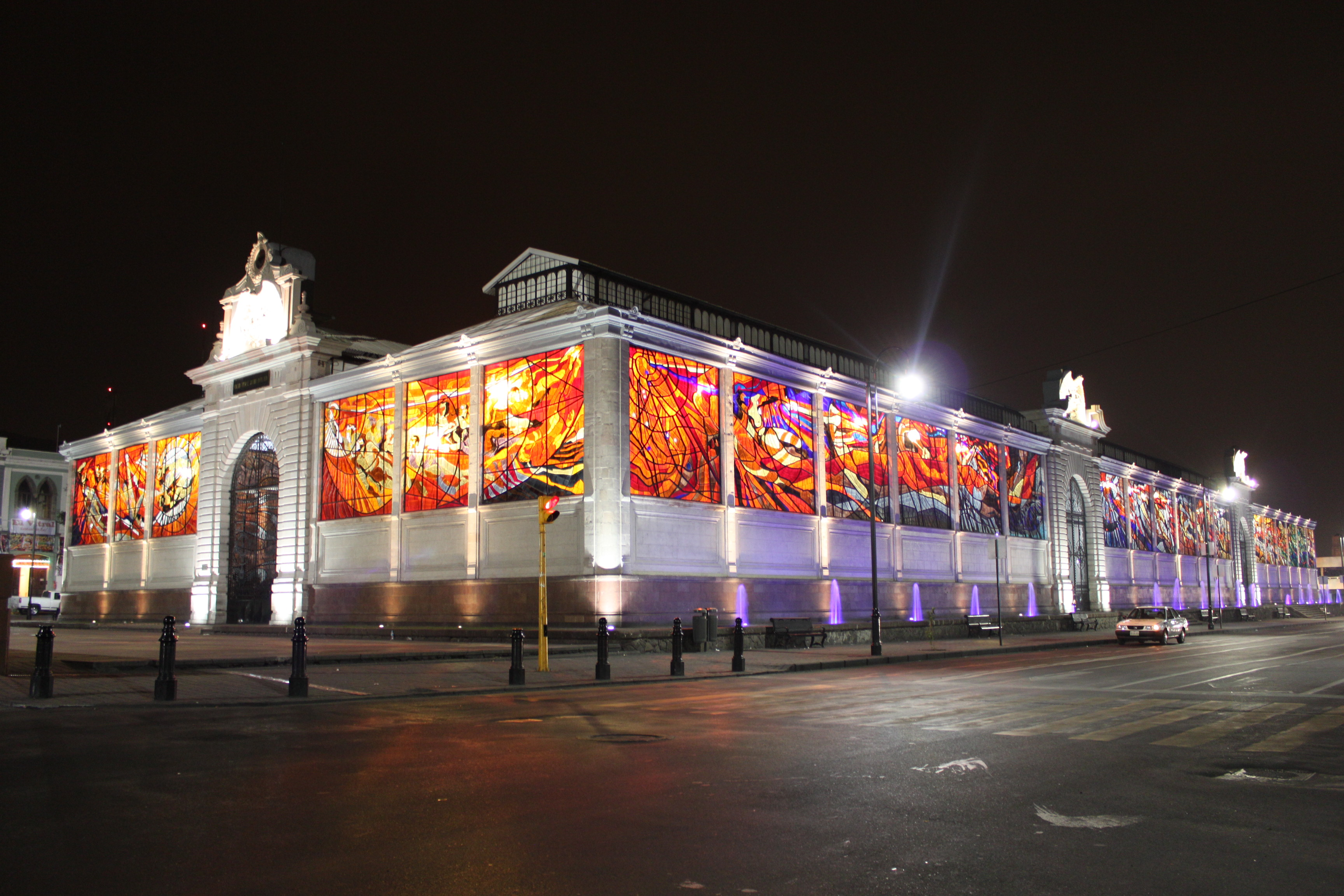 Cosmovitral, Toluca de Lerdo, Estado de México, México.